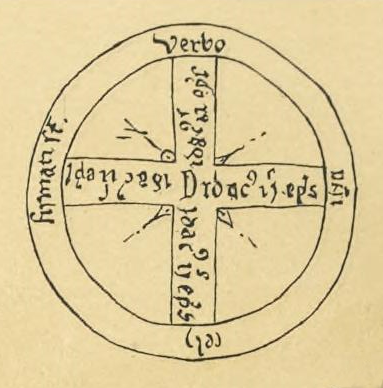 Signo ou sinal rodado de Diego Xelmírez, bispo de Santiago de Compostela (1100-1136).